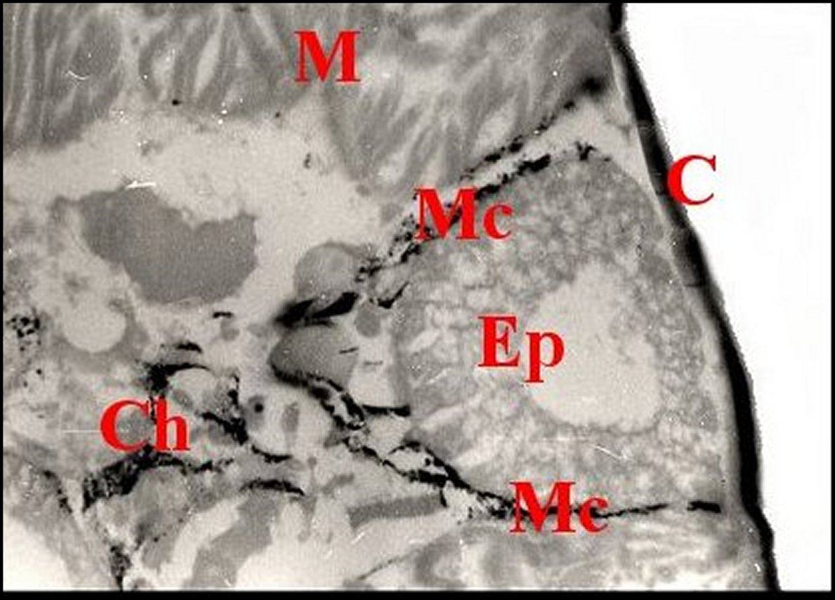 Glande prégonoporale d' Holocnemus pluchei à contour souligné par des chromatophores